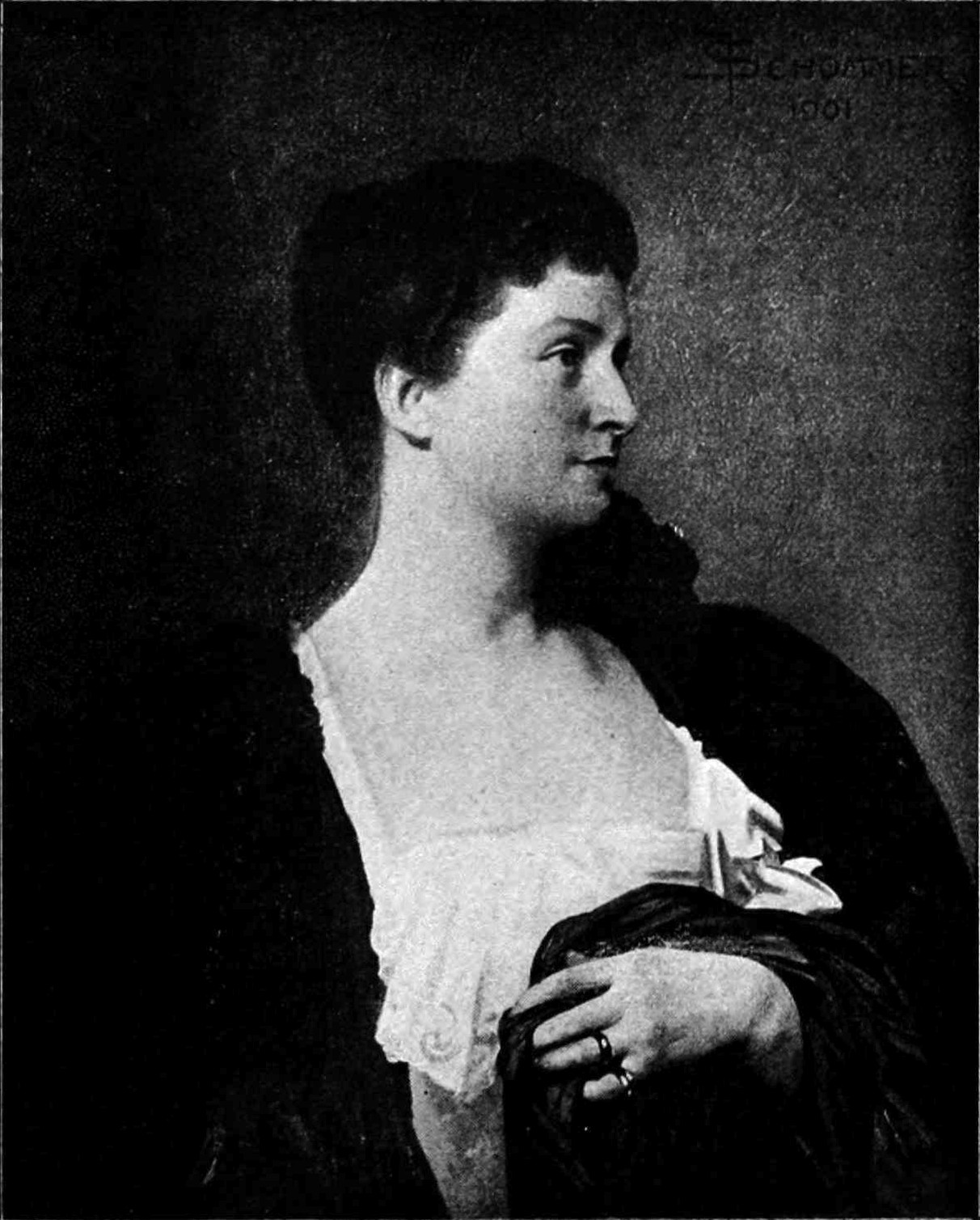 Portrait de madame Emma Eames